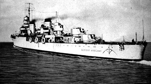 L'incrociatore Scipione Africano in navigazione fonte: sito marina militare